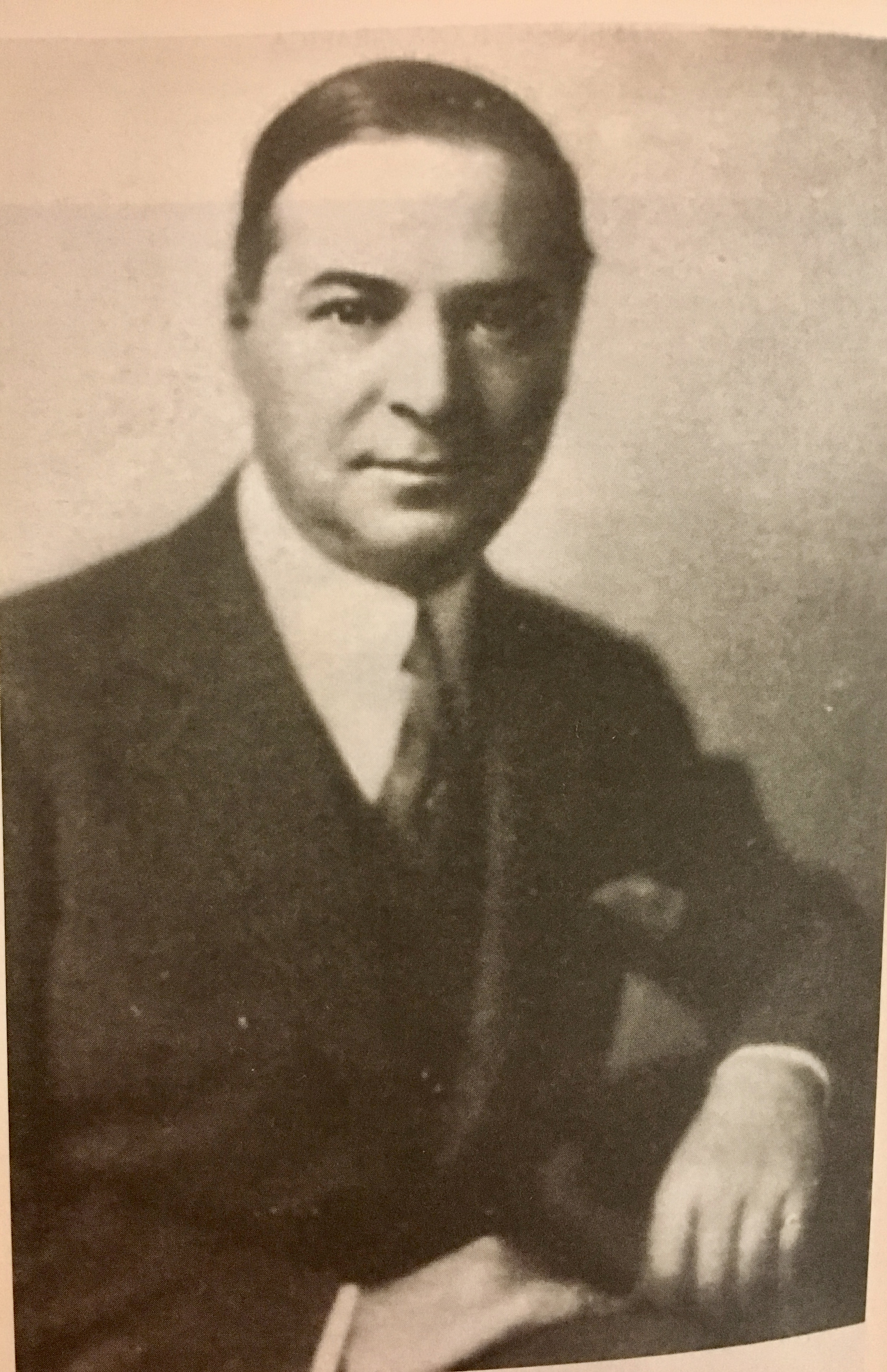 Umberto Gnoli nel 1930